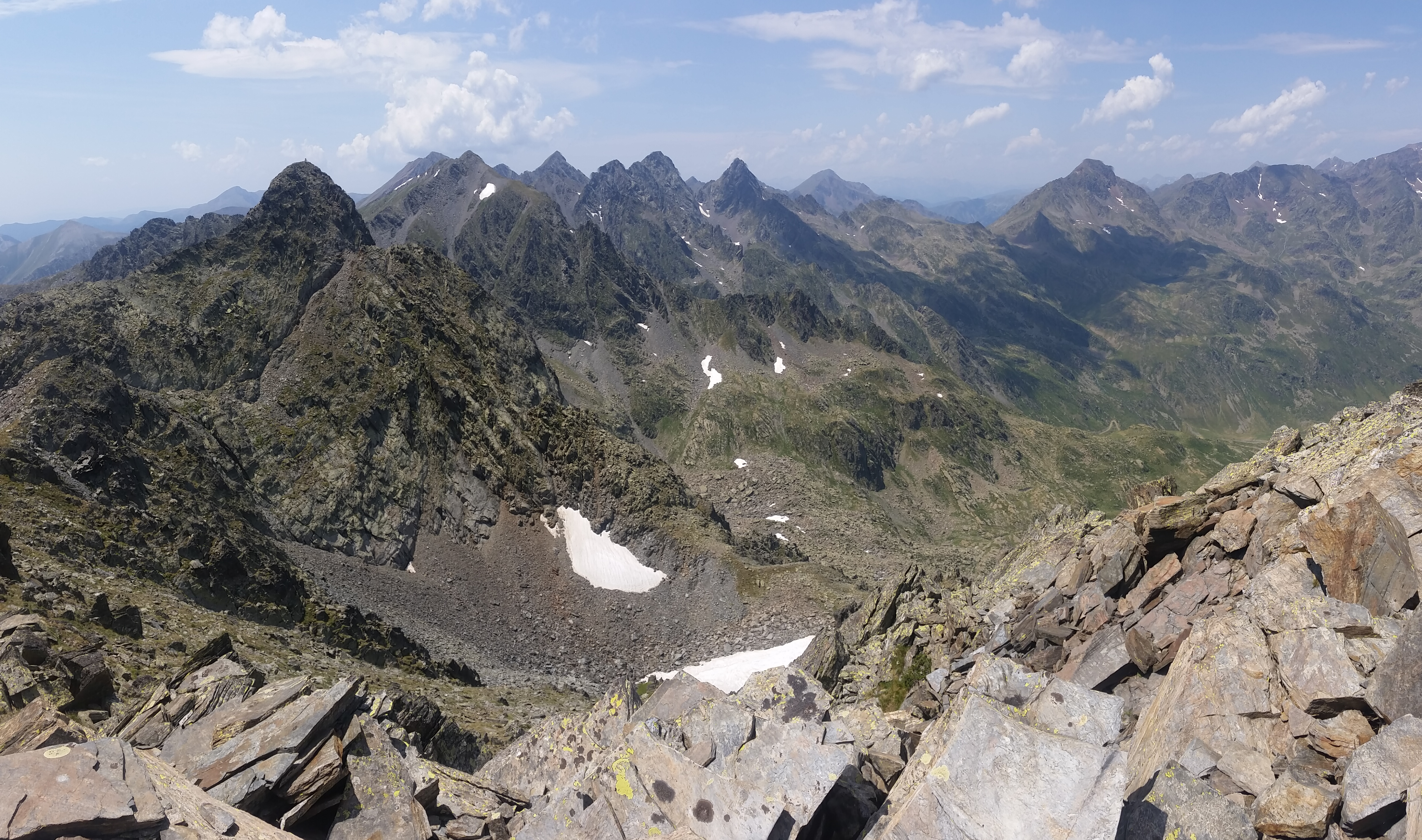 Muntanyes de l'Arieja des del cim del Cataperdís